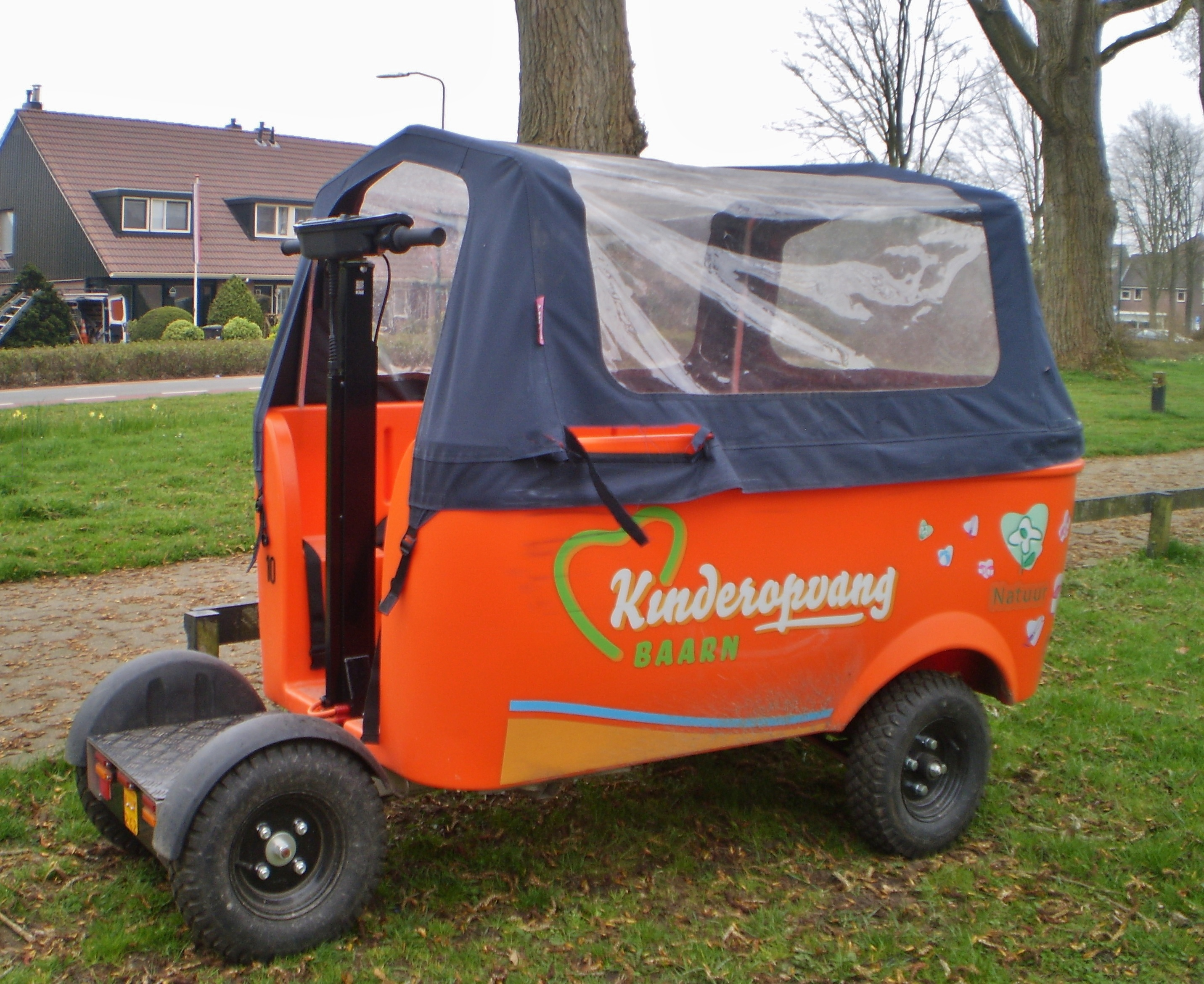 Zijaanzicht van een stint